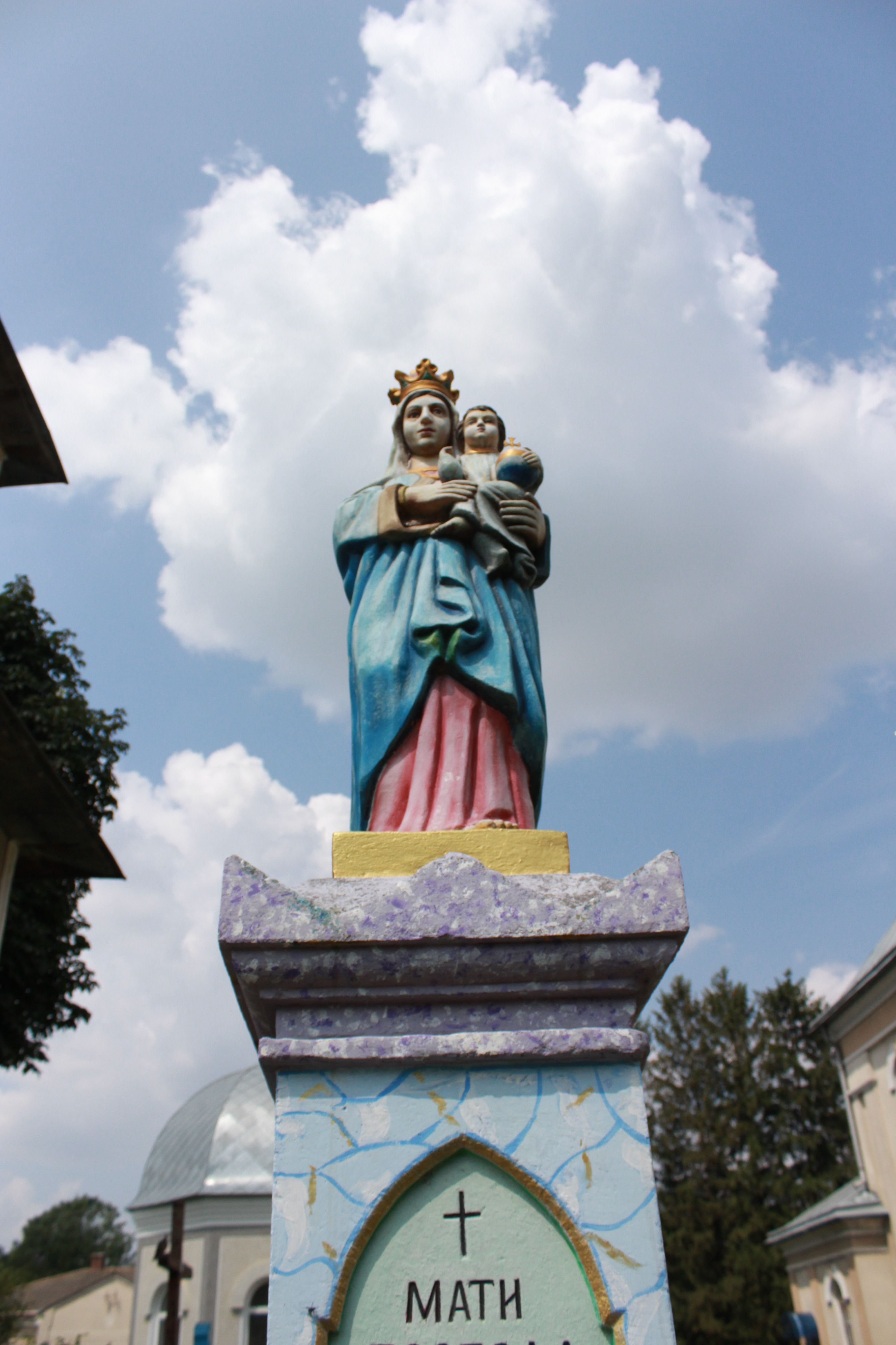 Скульптура Матері Божої з Ісусом, село Джурин, біля церкви